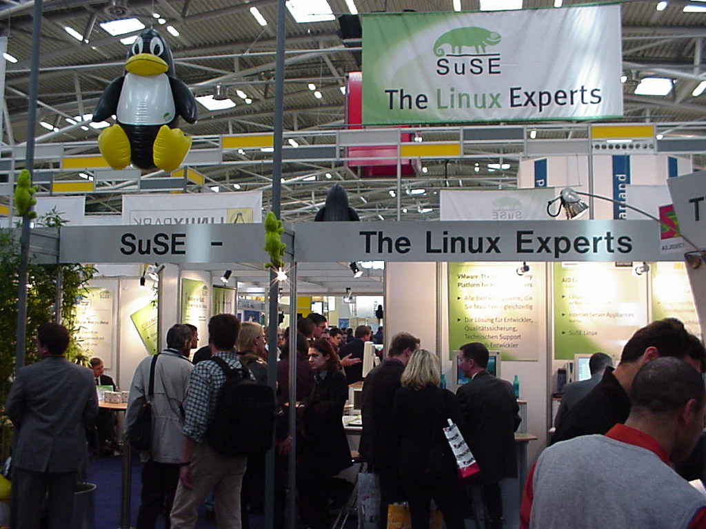 Messe Stand der SuSE Linux AG auf der Systems 2000 in München